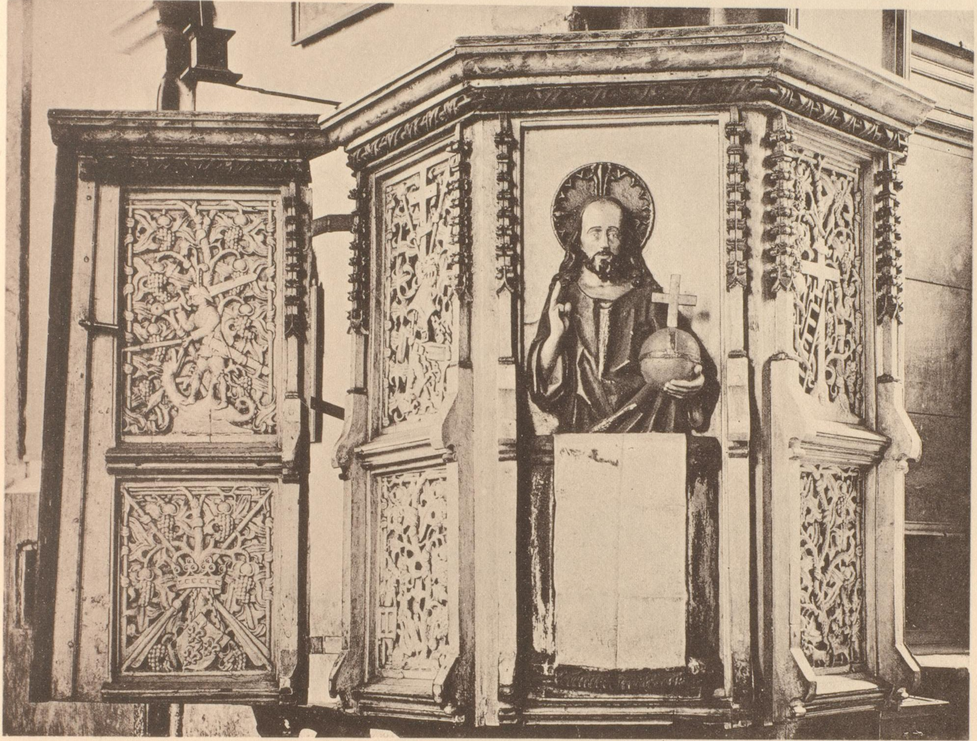 Die im 2. Weltkrieg zerstörte Kanzel in der Petrikirche in Dortmund.